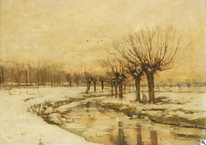 Helmuth Liesegang Winter im Düsseltal